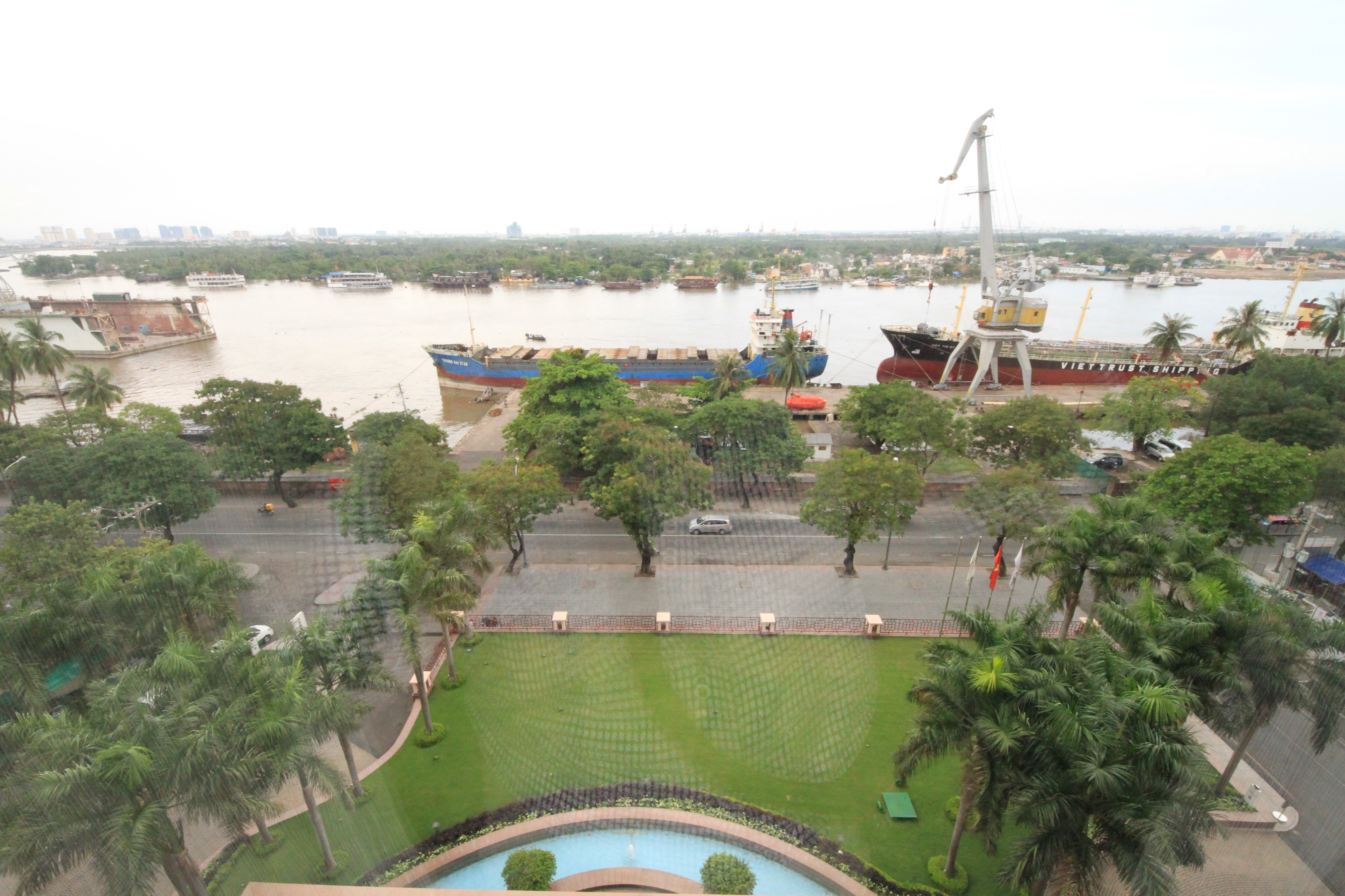 Bến Nghé, District 1, Ho Chi Minh, Vietnam